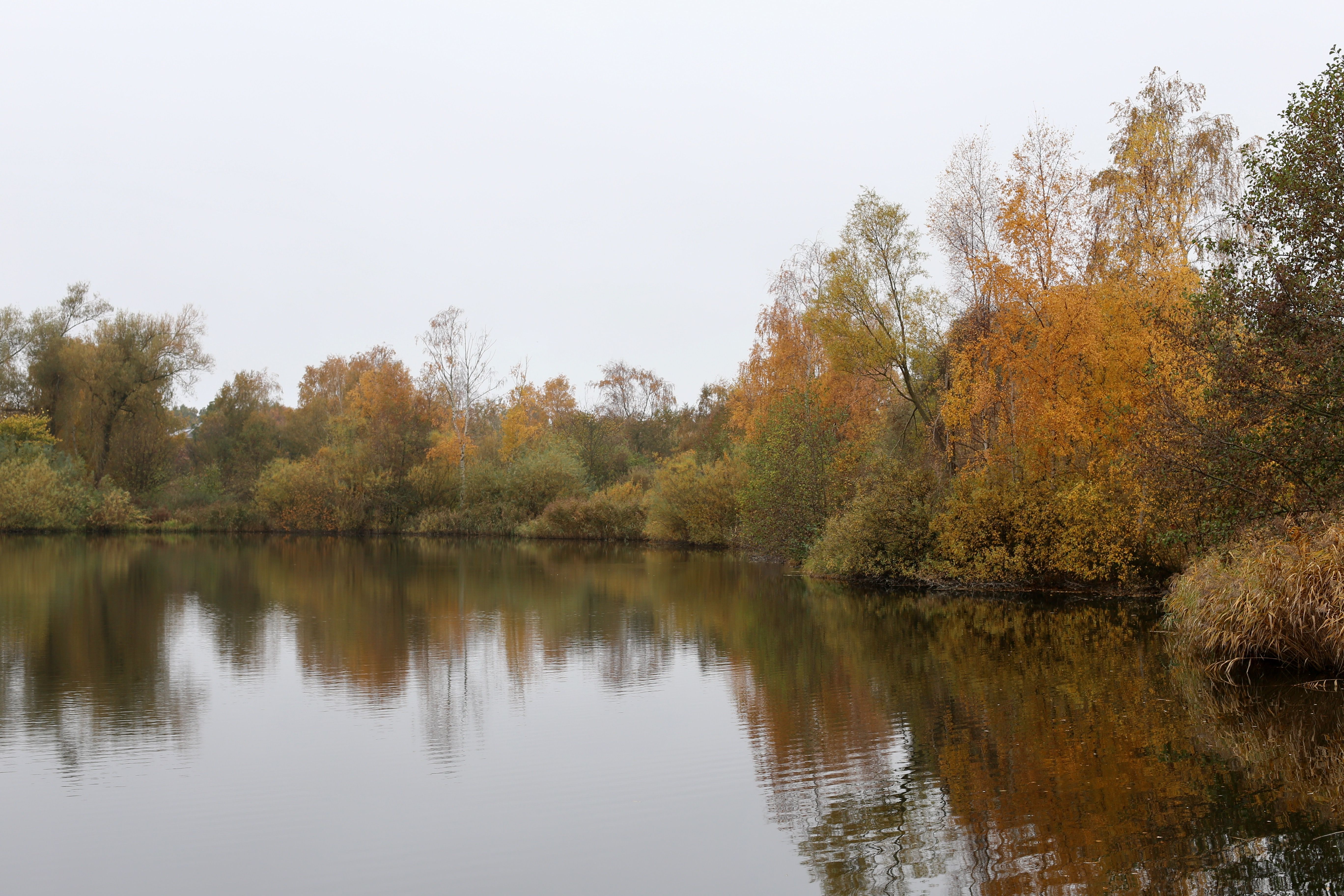 Søen i den østlige ende af Sillebro Ådal